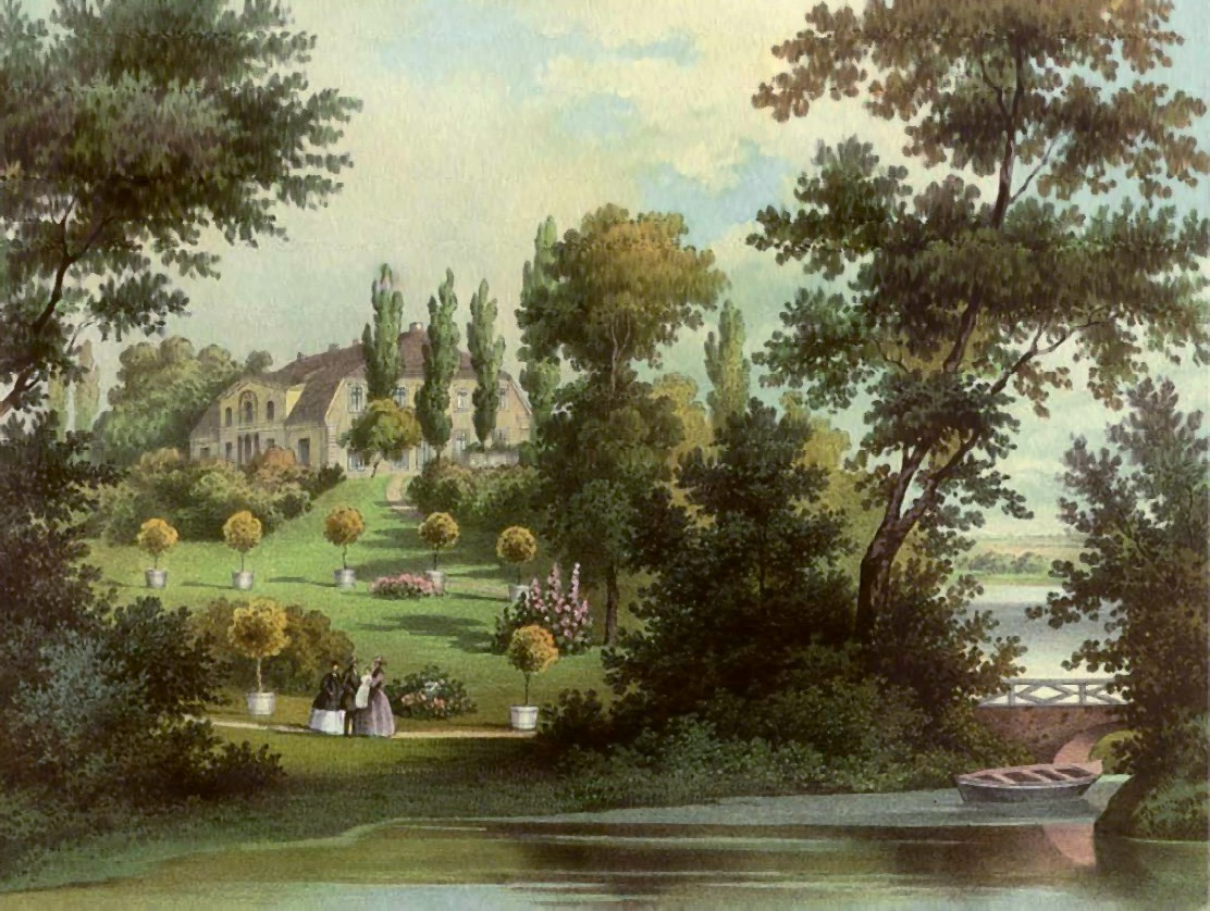 Gut Goldensee